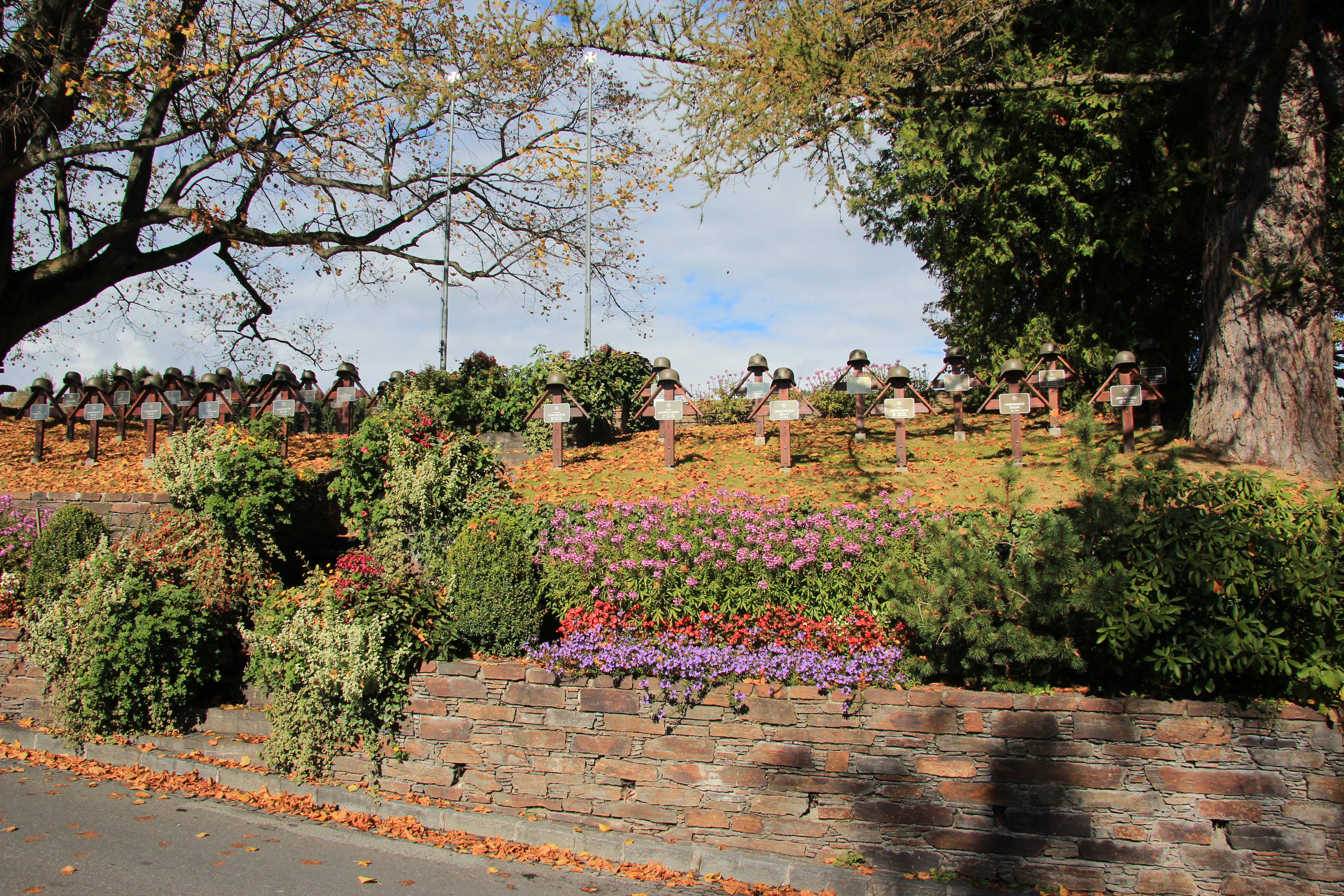 Sankt Jakob im Walde im steirischen Joglland